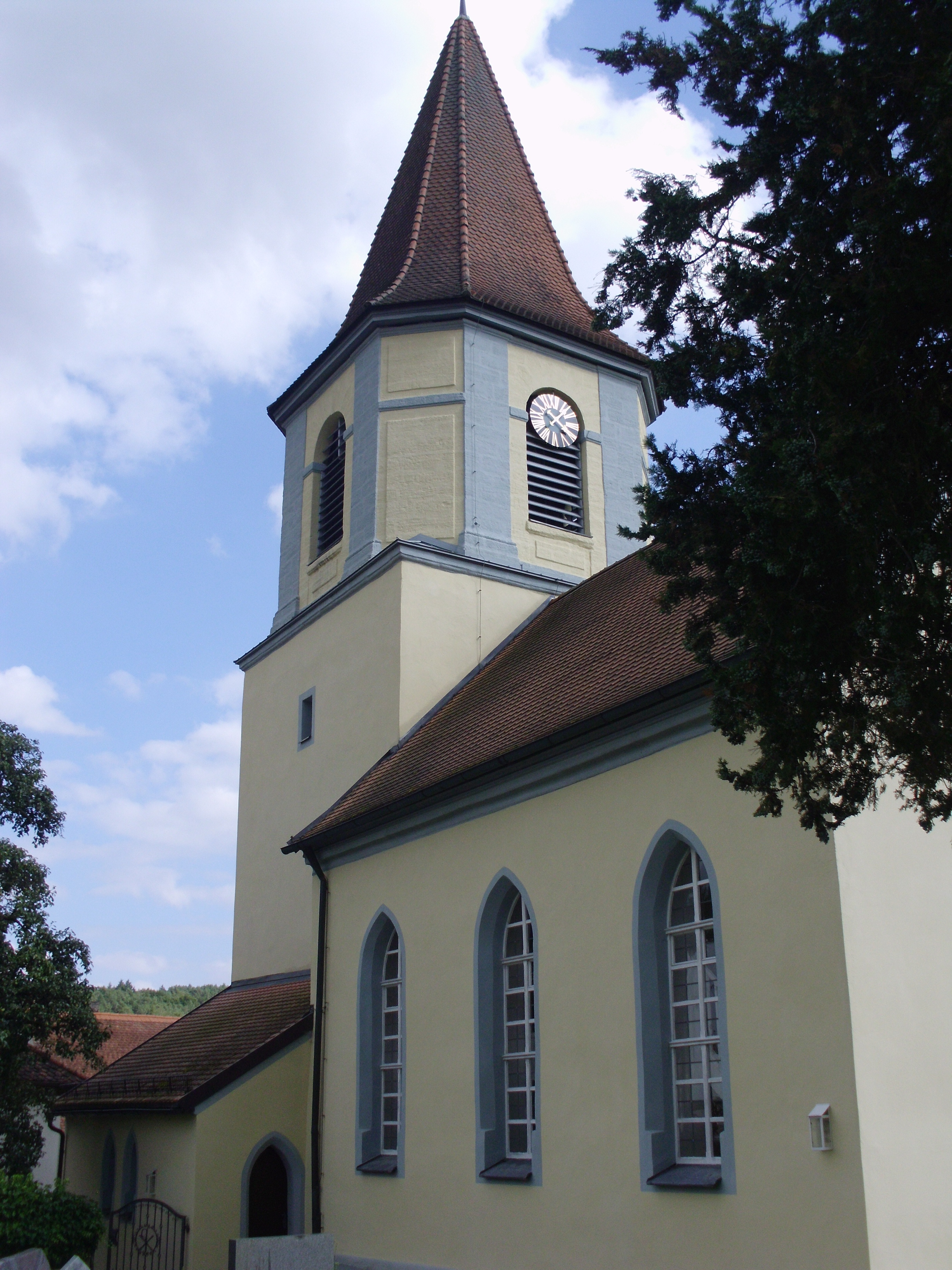 Schwimbach. Ortsteil von Thalmässing im mittelfränkischen Landkreis Roth, Evangelisch-lutherische Pfarrkirche St. Lorenz